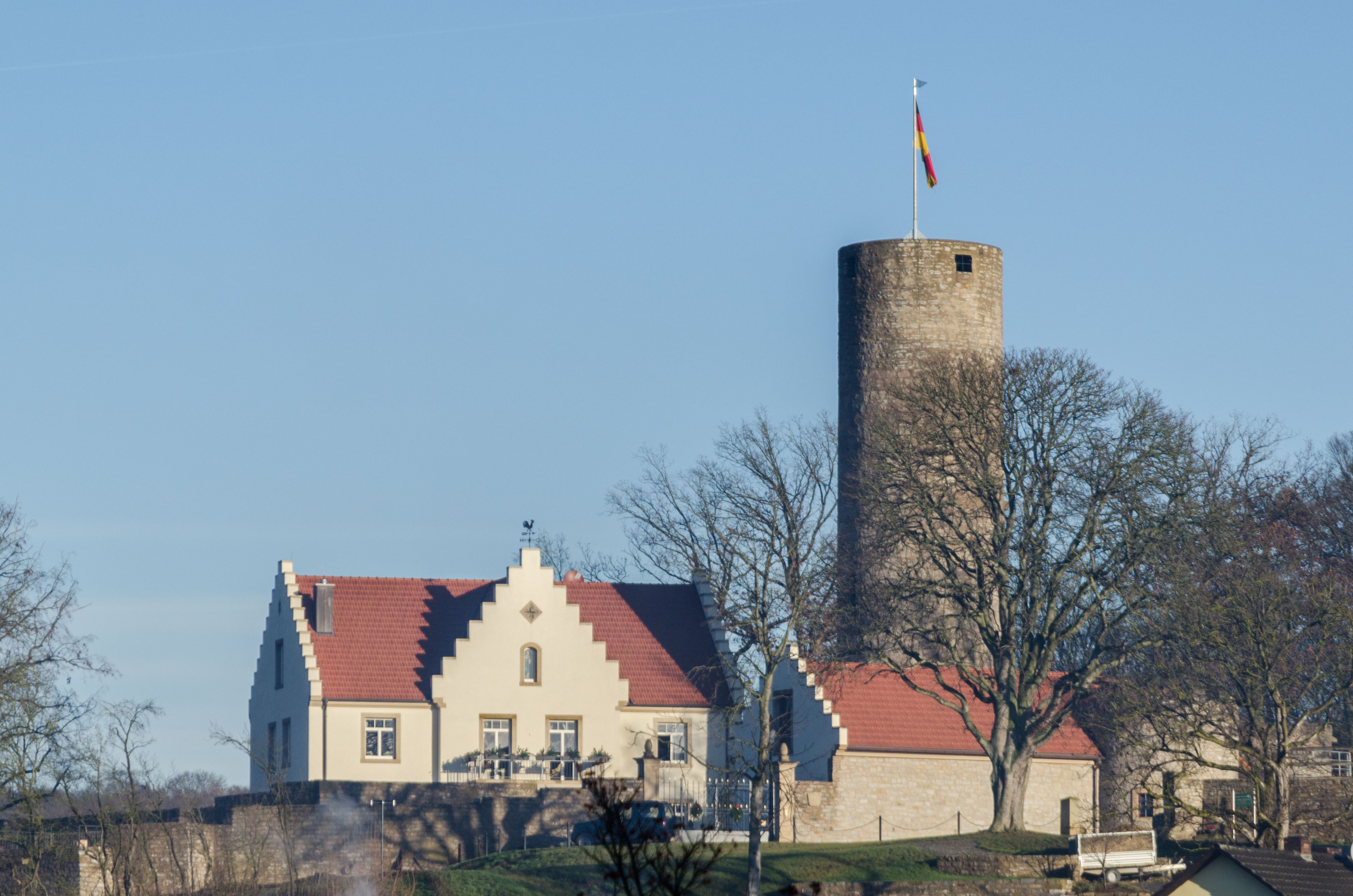 Arnstein, Büchold, Burg